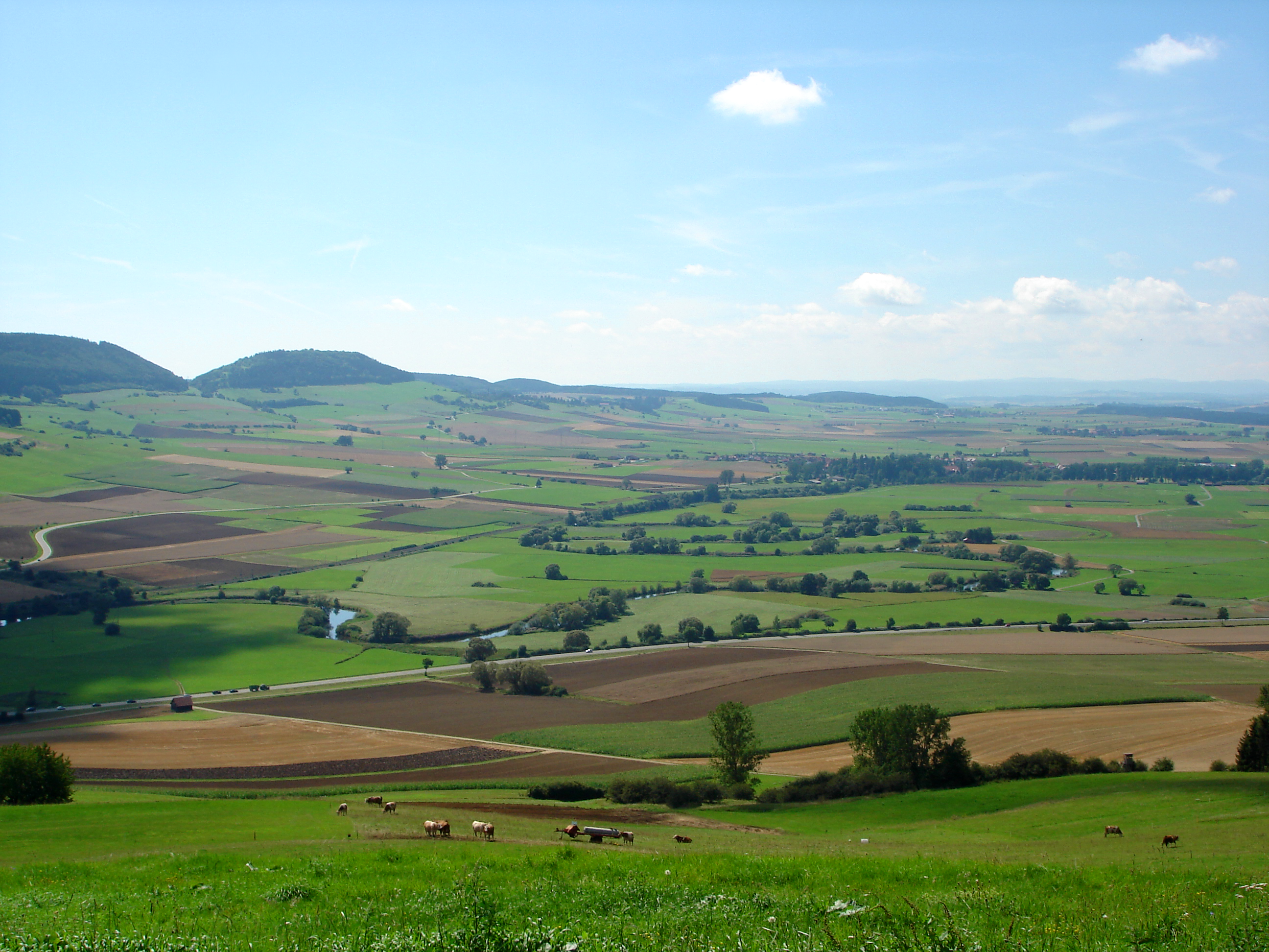 Deutschland: Blick vom Wartenberg auf die Landschaft der Baar und die Donau